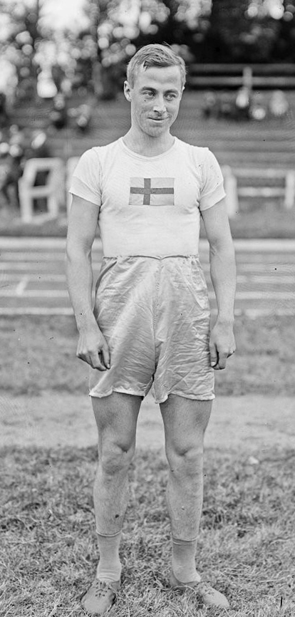 28-8-20, Colombes, [Folke] Janson (suédois) gagnant du triple saut : [photographie de presse] / [Agence Rol]